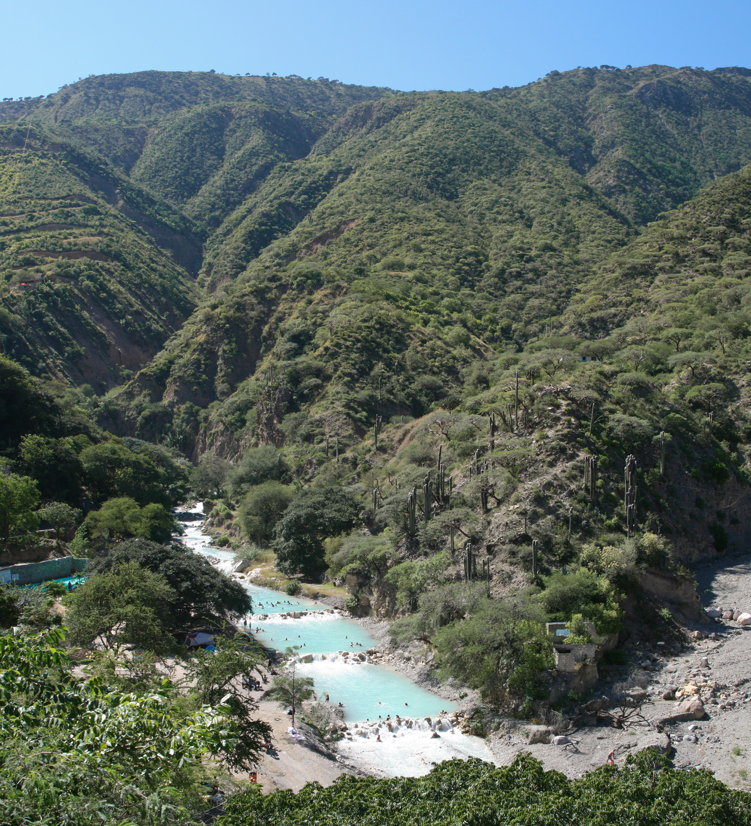 Agua y arena